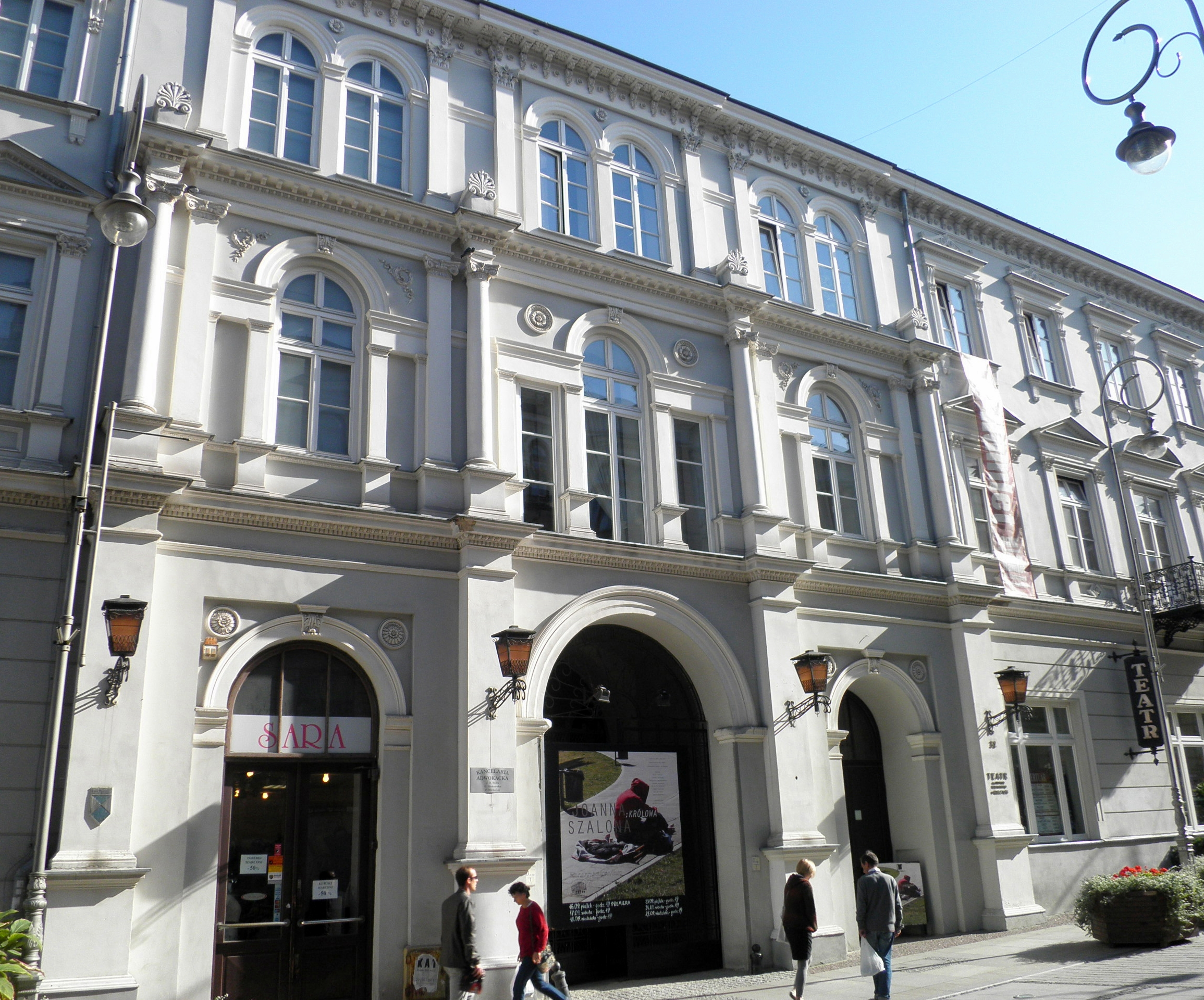 Teatr przy ul. Sienkiewicza 32 w Kielcach